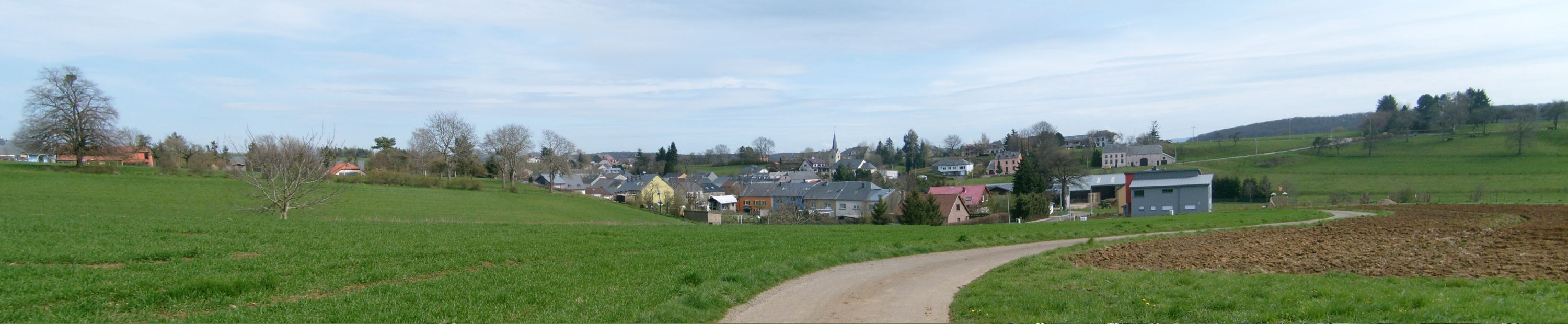 Féngeg.